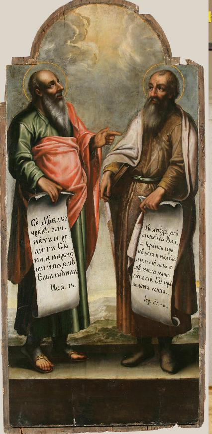 1730-е гг. Дерево, темпера, масло; 165 х 77,2 Поступила в 2009 году Раскрыта в научно-реставрационном отделе Национального художественного музея Республики Беларусь художником- реставратором Ю.В. Мисюченко в 2007 г.; консервация памятника – Д.А. Карлионов в 2010 г. Икона находилась в пророческом ряду 3-ярусного иконостаса Успенского собора Жировичского монастыря. Иконостас сооружался в 1736–1737 гг., вероятнее всего, в это же время написаны иконы пророческого и апостольского (деисусного) рядов.